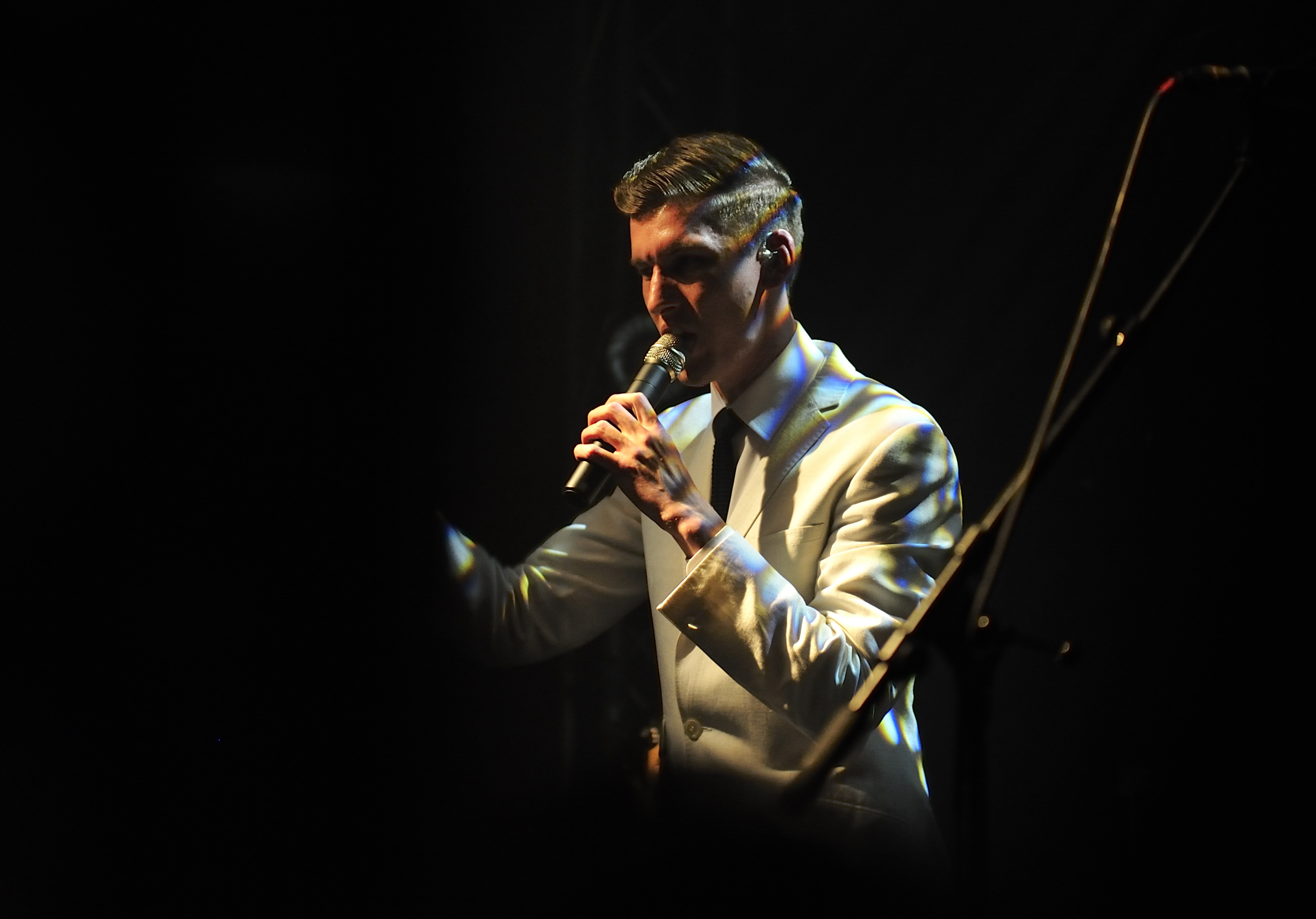 Flèche d'Or